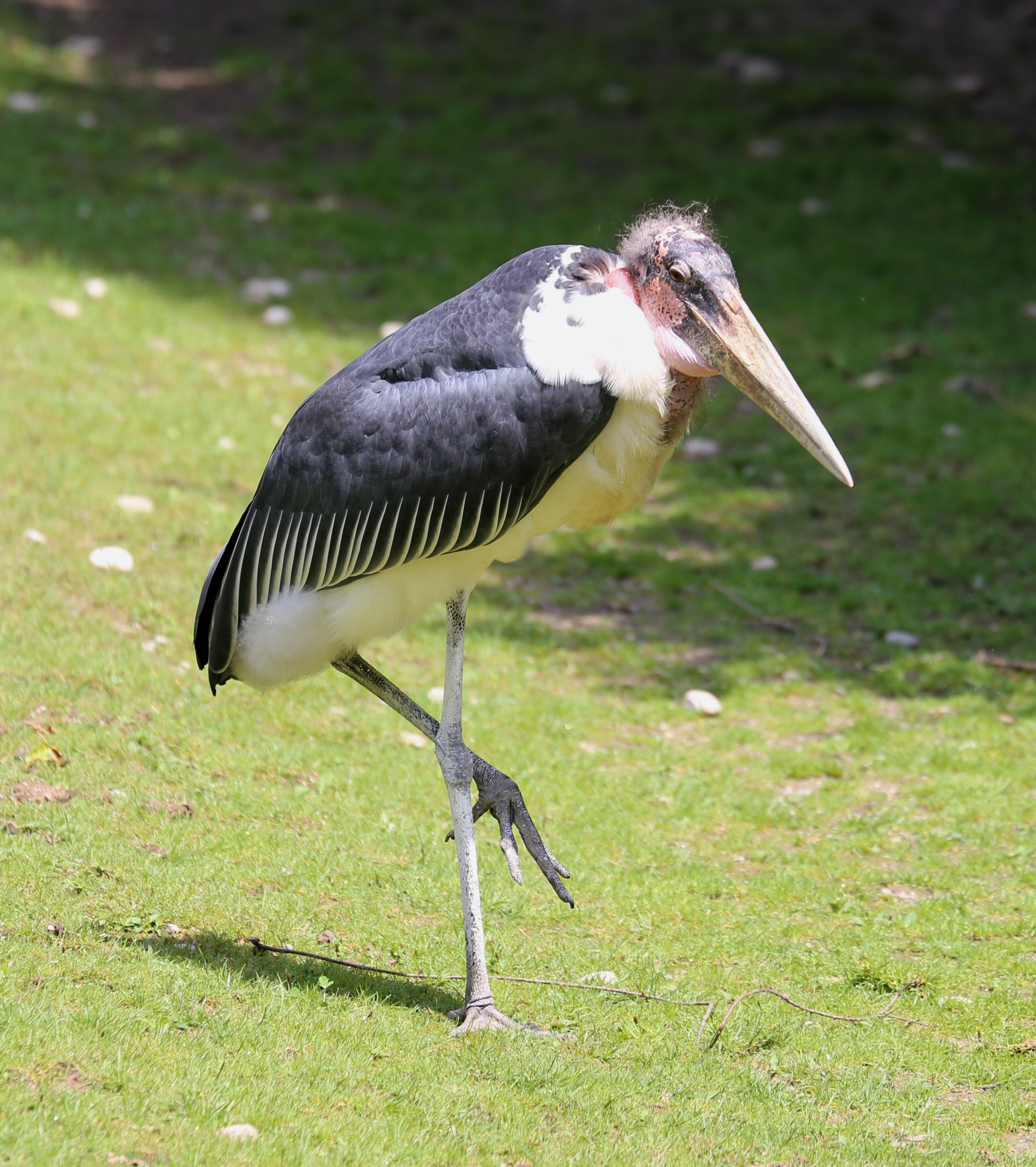 Marabu (Leptoptilos crumeniferus) im Tierpark Hellabrunn, München